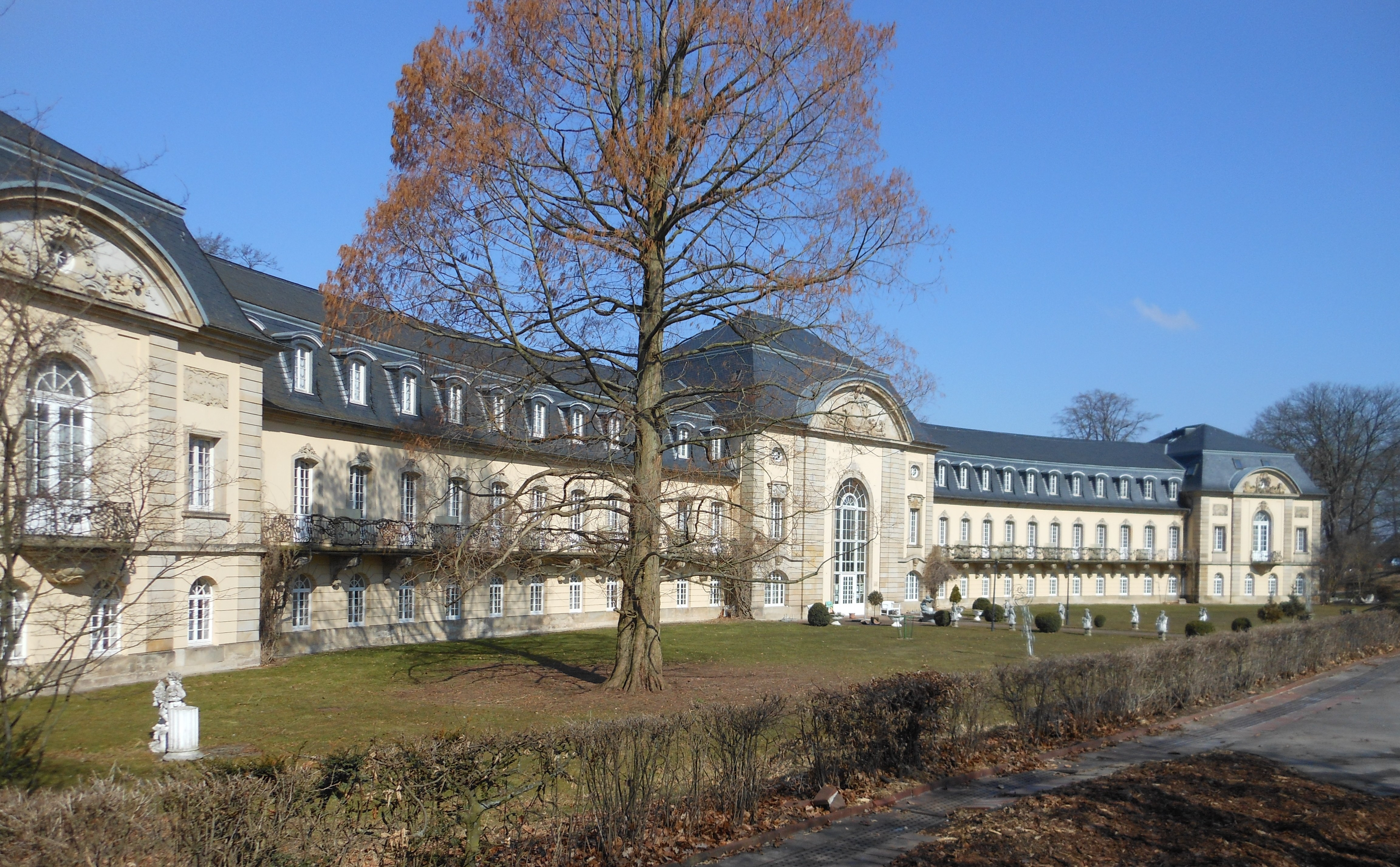 Bad Nenndorf, ehemaliges Schwefelbadehaus am Kurpark, vollendet 1906 im Neu-Rokoko-Stil, heute Grandhotel Esplanade